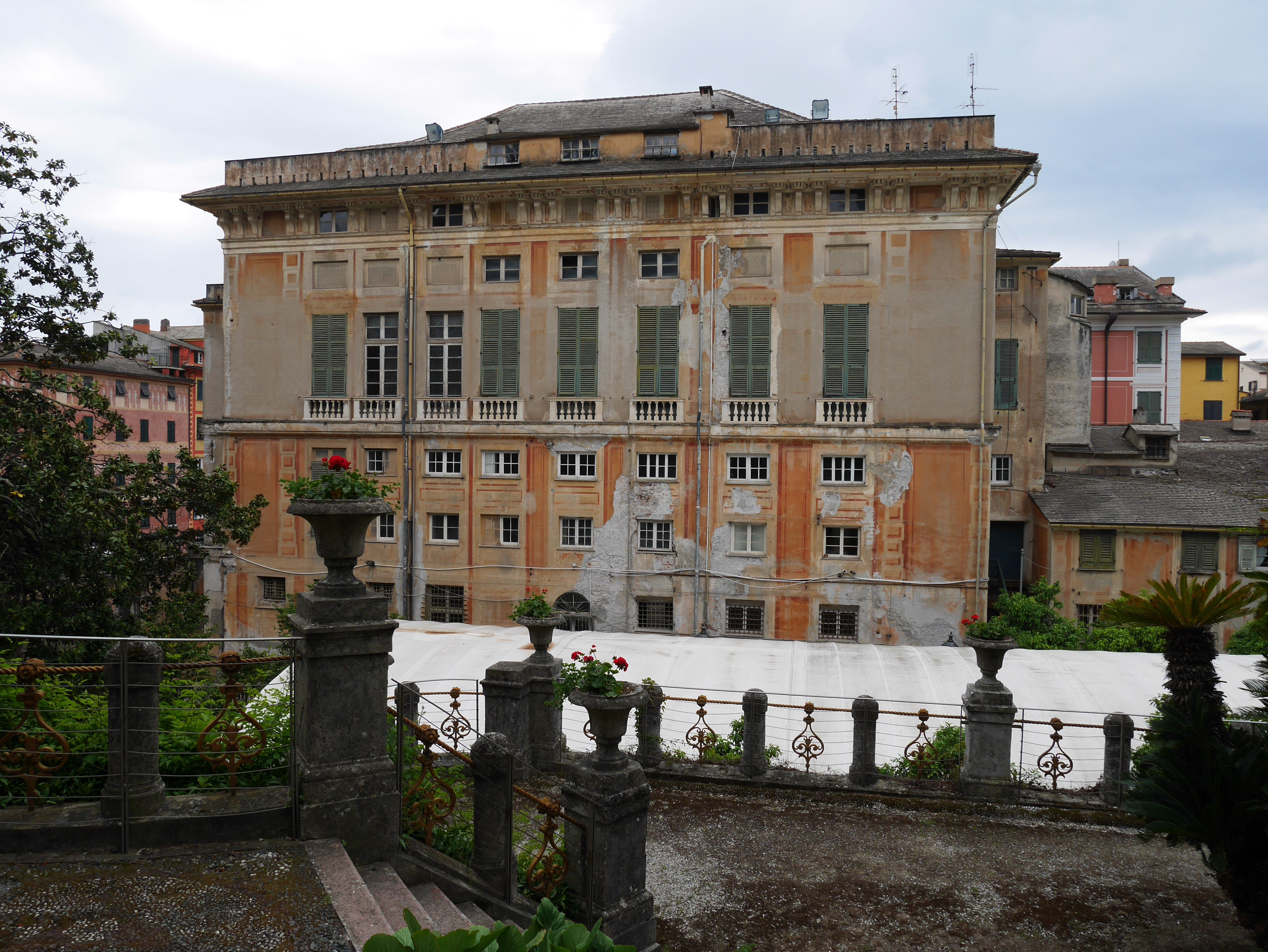 Museo archeologico di Chiavari This is a photo of a monument which is part of cultural heritage of Italy.